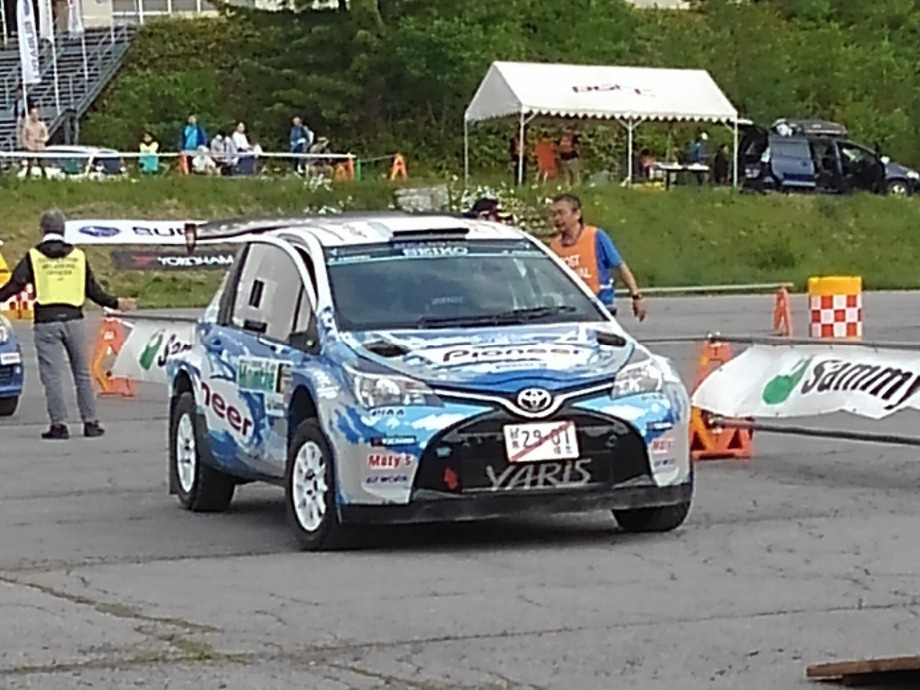 日本スーパーラリーシリーズにて、映画『OVER DRIVE』で実際に使用された炭山裕矢/保井隆宏組のヤリス